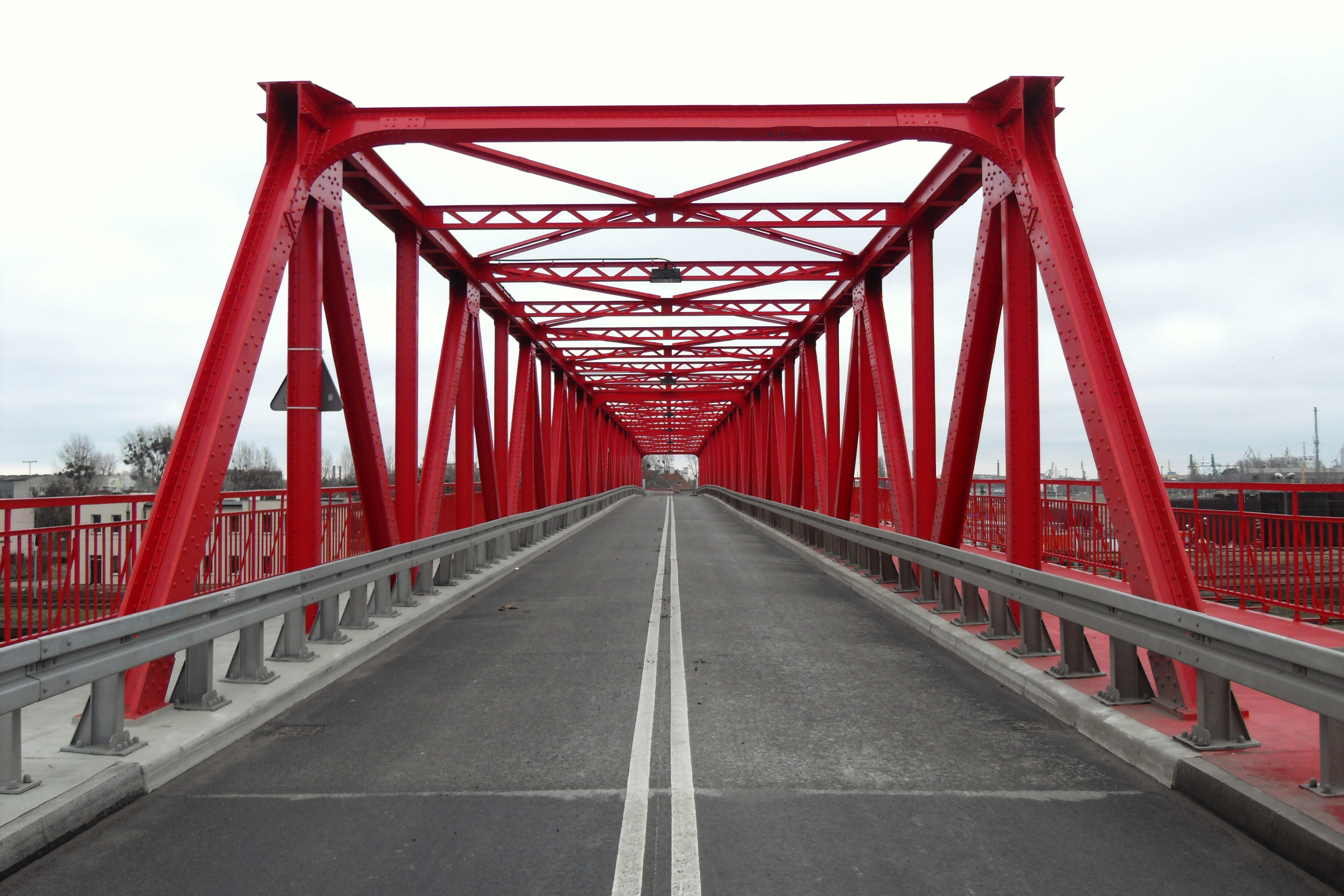 Gdańsk. Przedwojenny wiadukt na granicy Wrzeszcza i Letnicy, tzw. "Czerwony wiadukt" (po remoncie).